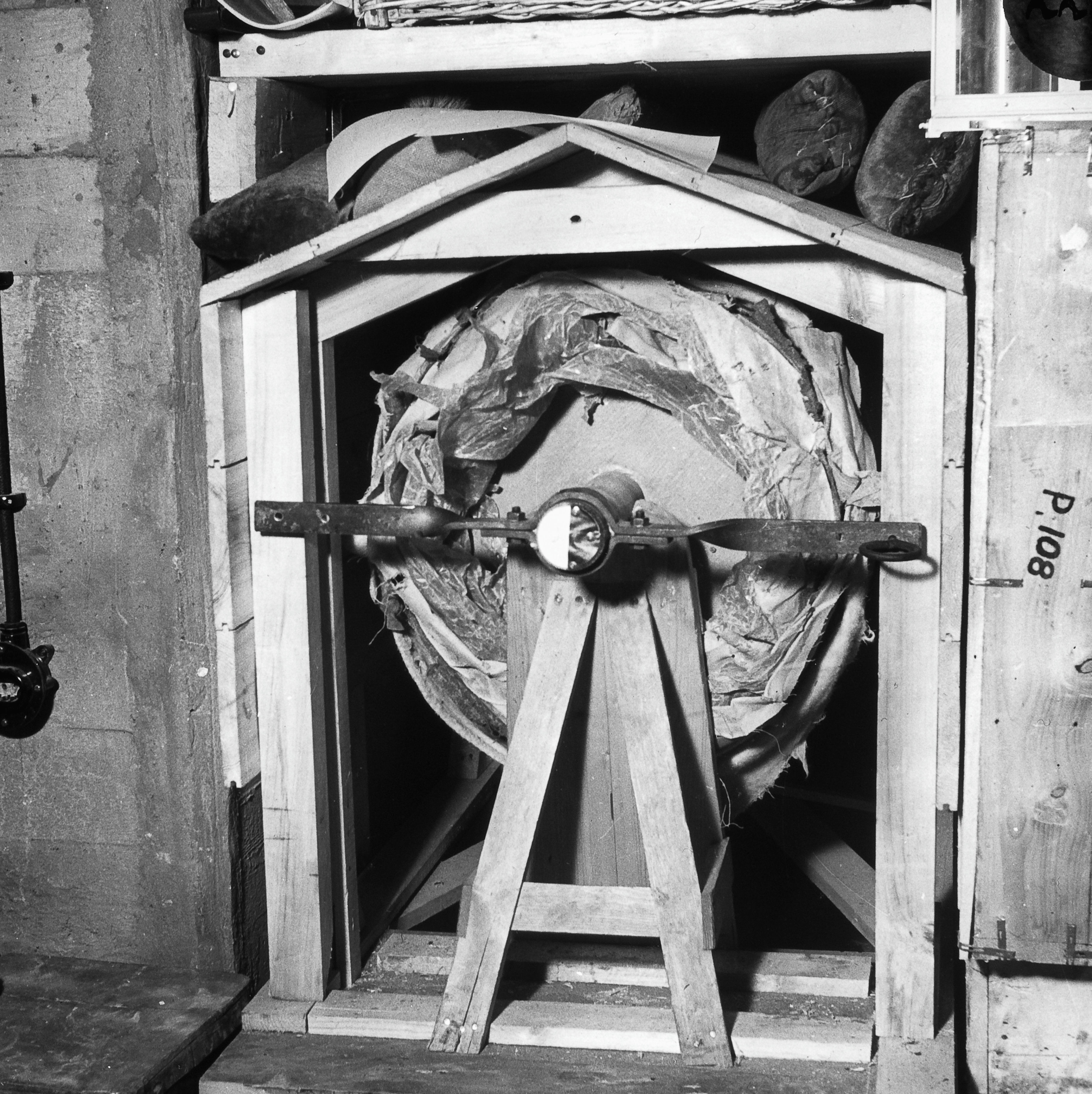 Sint Pietersberg: Apparaat dat in als schuilkelder dienstdoende mergelgrot opgeslagen staat. In deze installatie werd in de Tweede Wereldoorlog de Nachtwacht bewaard. Het rotatiemechanisme behoedde het schilderij voor doorligschade.